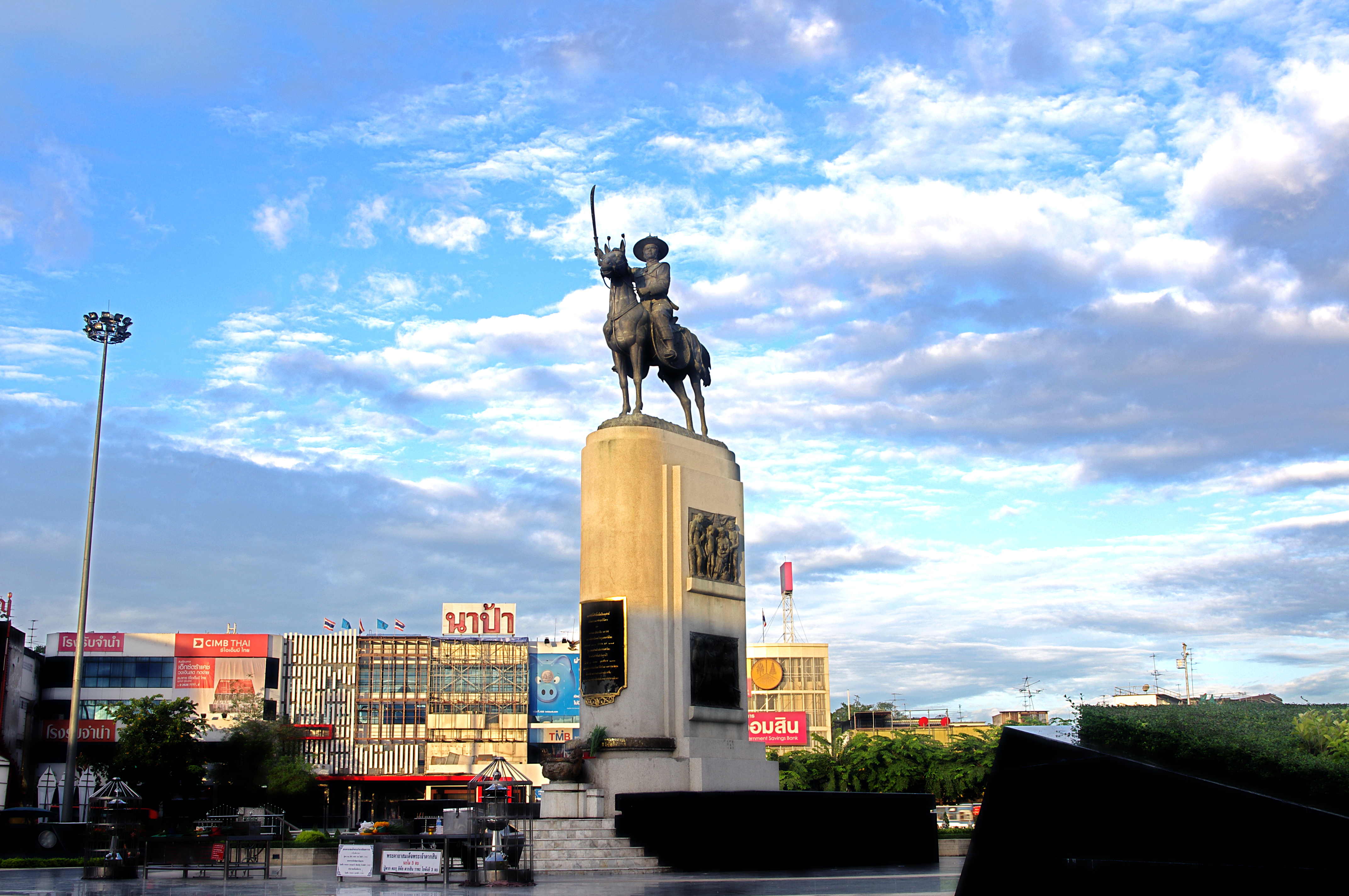 พระบรมราชานุสาวรีย์ สมเด็จพระเจ้ากรุงธนบุรี ตั้งอยู่ใจกลางวงเวียนใหญ่ เป็นอนุสาวรีย์และสวนสาธารณะขนาดเล็ก ที่ชาวธนบุรีนิยมไปออกกำลังกายกัน